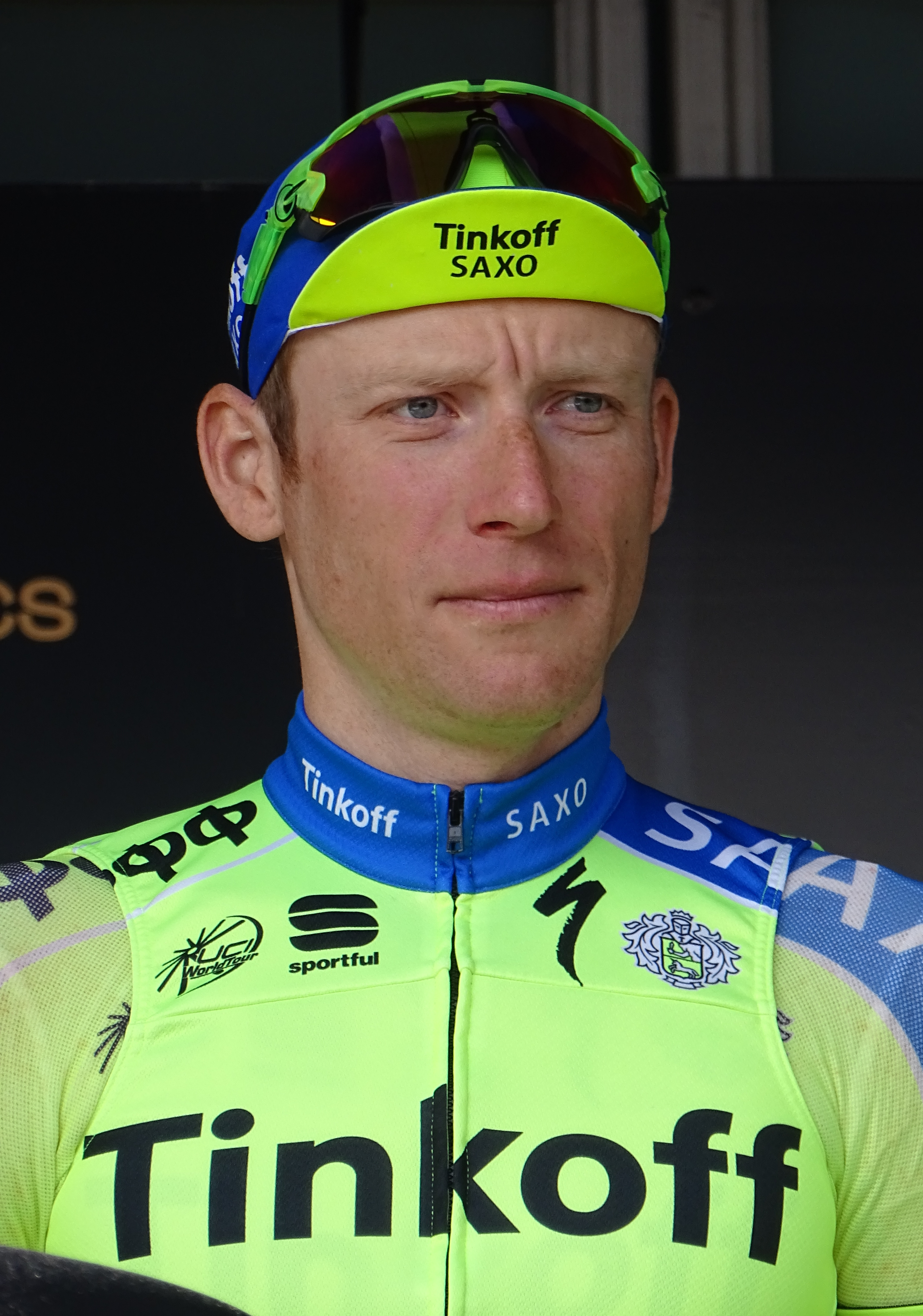 Reportage réalisé le mercredi 8 avril à l'occasion du départ du Grand Prix de l'Escaut 2015 à Anvers, Belgique.